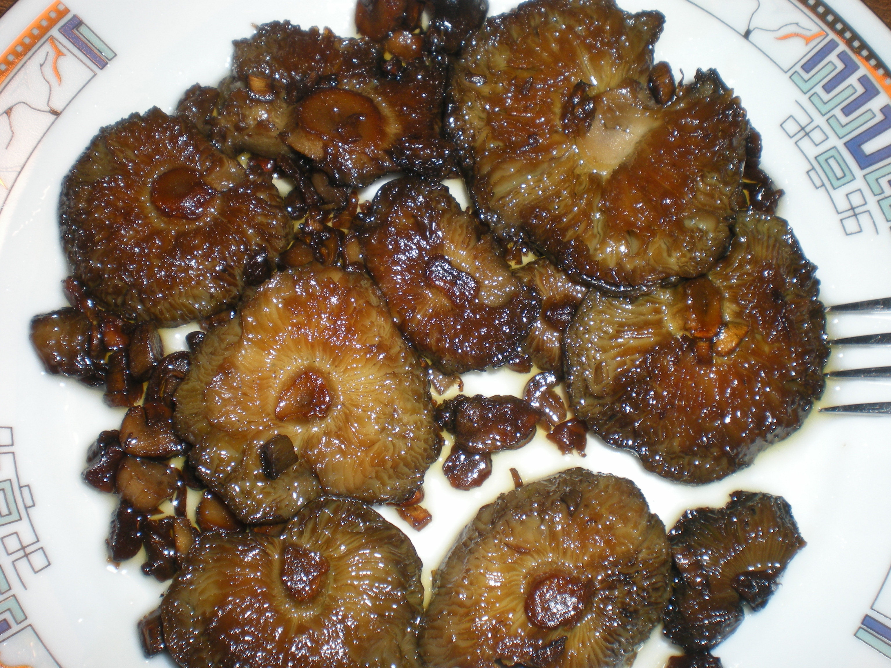 Gąska zielonka